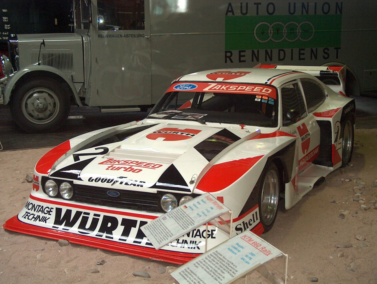 Ford Capri Zakspeed Klaus Ludwig) - Technikmuseum Sinsheim Aufnahmedatum: Oktober 2004